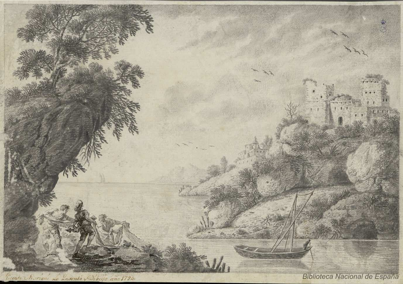 Vicente Mariani: Paisaje con lago y castillo en ruinas, aguada gris a pincel con retoques de tinta a pluma. Firmado: Vicente Mariani lo Inventó y Dibujó año 1794. Biblioteca Nacional de España.